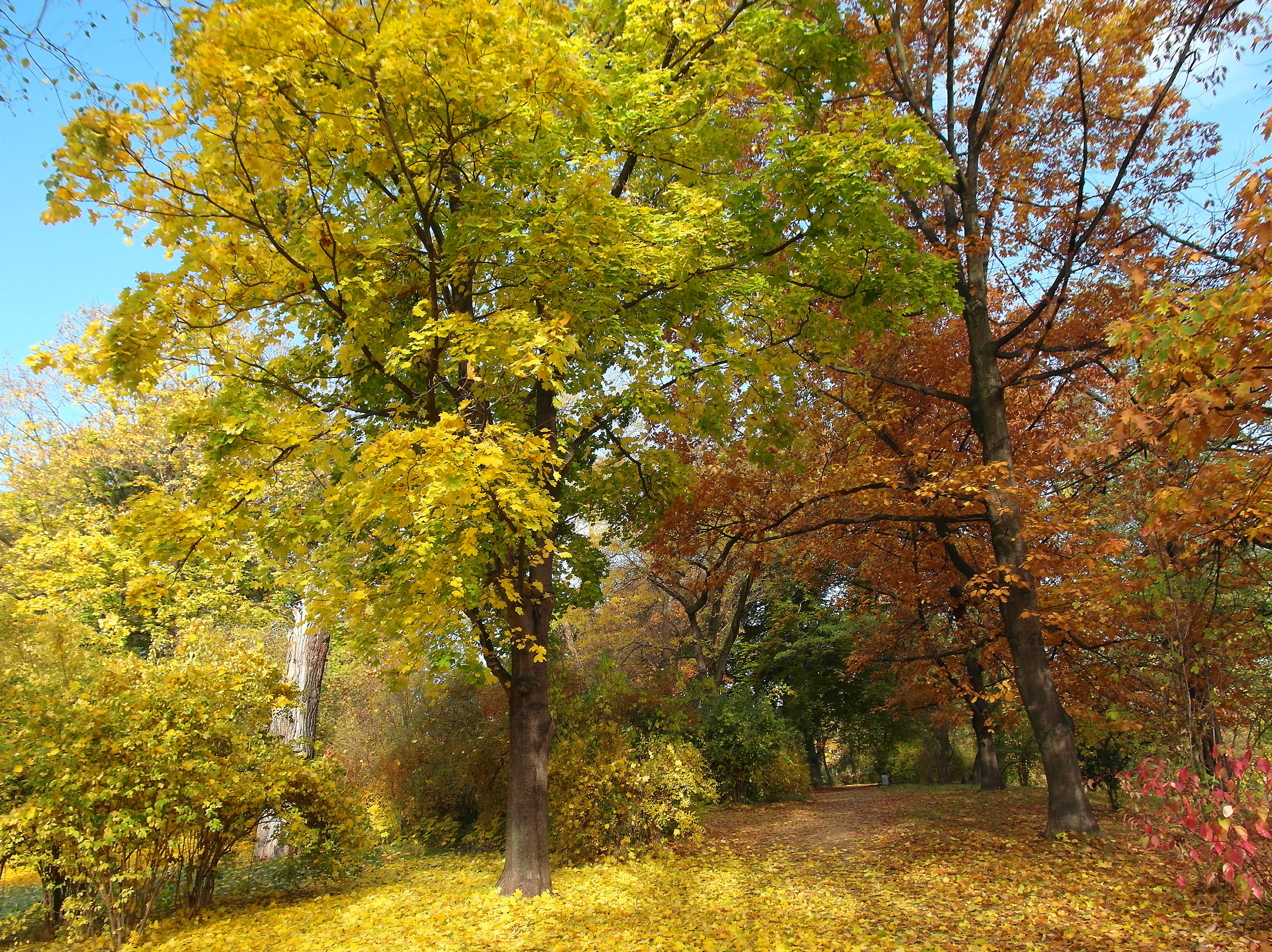 29.10.2012 01217 Dresden-Südvorstadt, Am Beutlerpark (GMP: 51.031311,13.743365): Herbst im Park. Der Beutlerpark ist eine alte militärische Schanze. Am 18.06.1866 rückte die preußische Armee in Dresden ein. Eine der damals errichteten Schanzen ist der heutige Beutlerpark. Hier war ein wichtiger strategischer Punkt. Etwa zehn solcher Befestigungsanlagen entstanden damals in Dresden. [SAM2974.JPG]20121029010DR.JPG(c)Blobelt